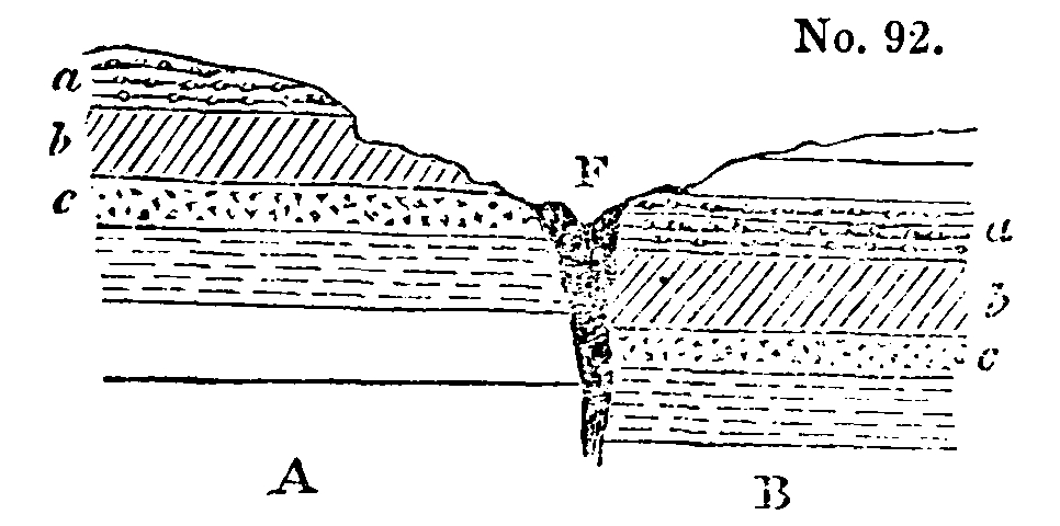 Fault